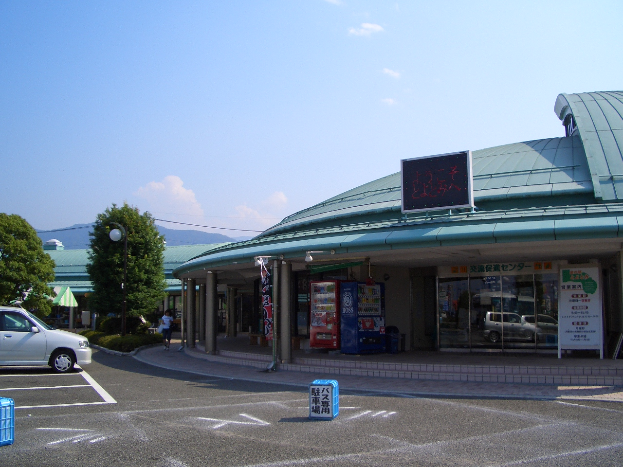 道の駅とよとみ(Michinoeki Toyotomi,yamanashi)